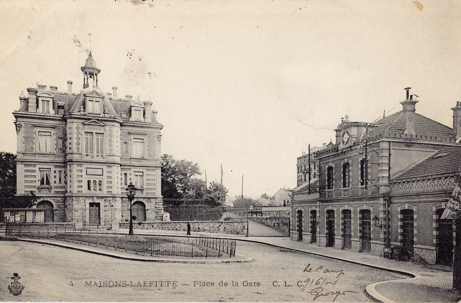 Carte postale ancienne éditée par CLC, n°4 :MAISONS-LAFFITTE - Place de la Gare